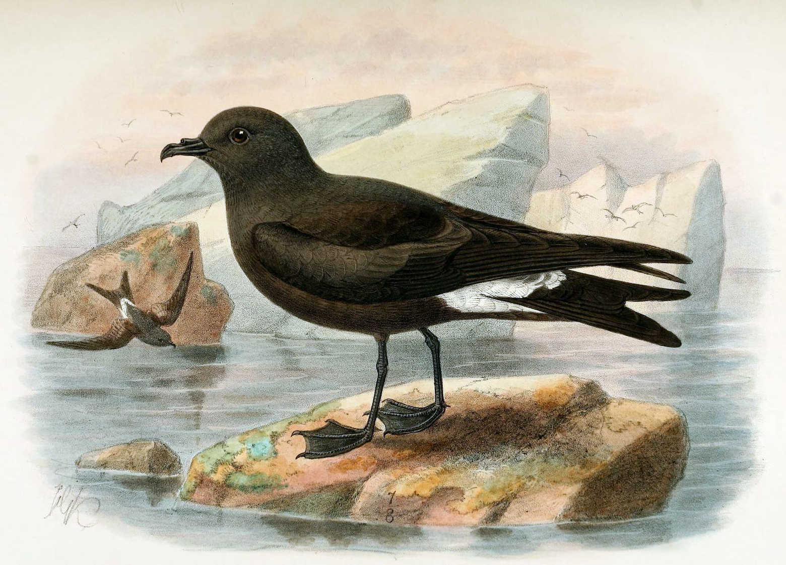 Guadeloupe Storm-Petrel (Oceanodroma macrodactyla)